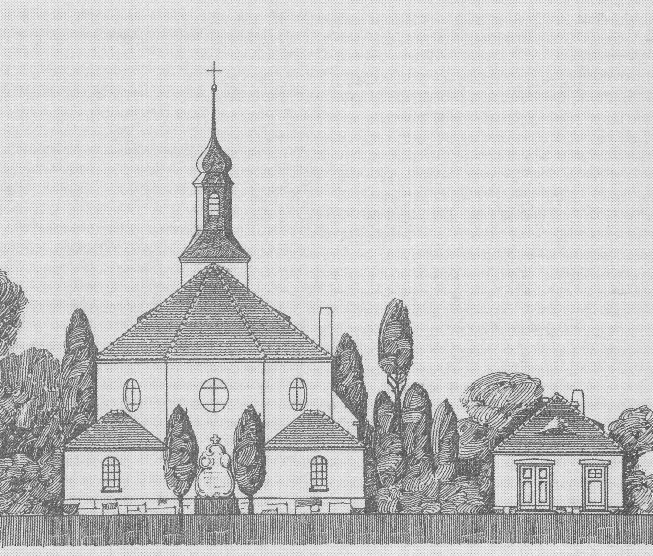 Radebeul Johanneskapelle Bauzeichnung 1906